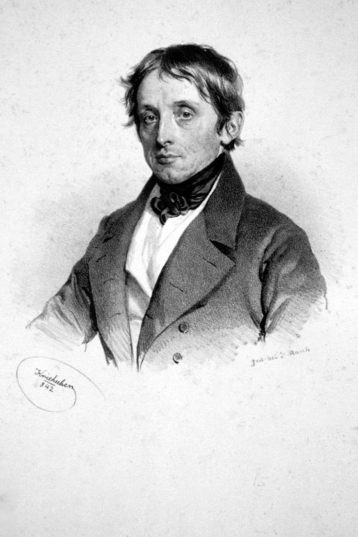 Simon Stampfer (1792-1864), österreichischer Mathematiker, Geodät und Erfinder. Lithographie von Josef Kriehuber, 1842